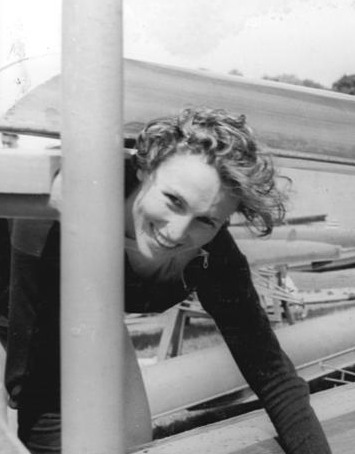 Ruth Harre, Johanna Knoll Ruth Harre vom SC Wissenschaft DHfK Leipzig legen nach errungenem Meisterschaftssieg im Leichtgewichts-Doppelzweier für Frauen ihr Boot ab. Sie siegten überlegen vor der BSG Motor Magdeburg und der BSG Einheit Sterkow-Mark in 4:19,8.